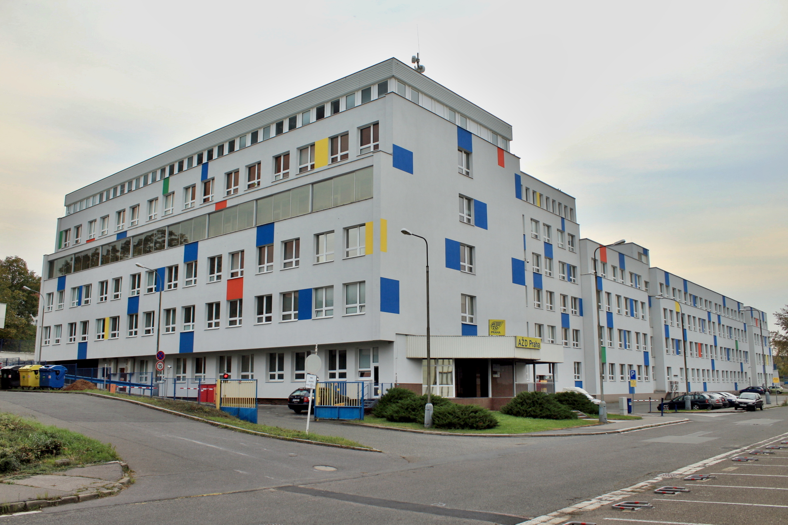 Budova AŽD Praha-Strašnice